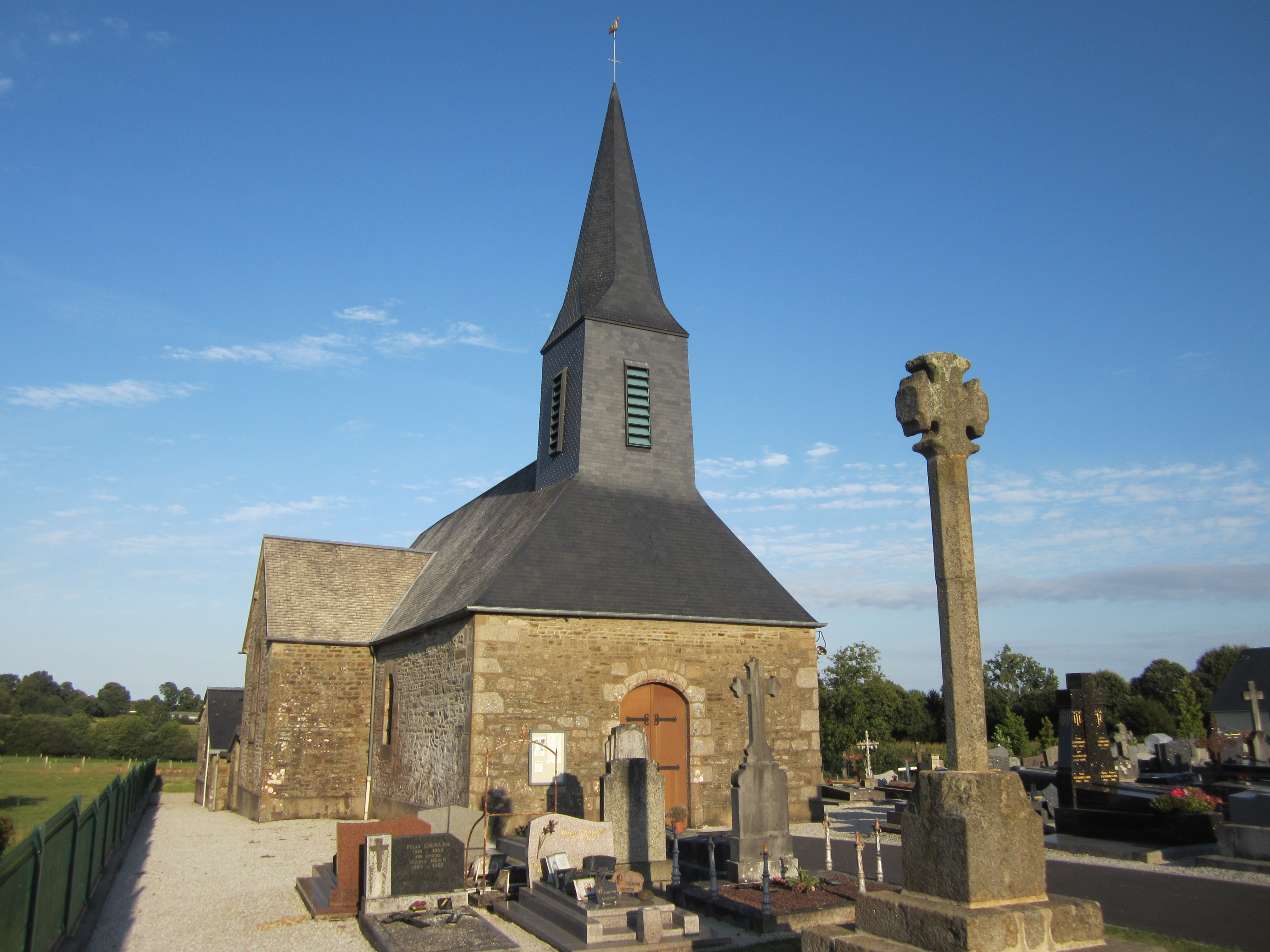 Naftel, Isigny-le-Buat, Manche